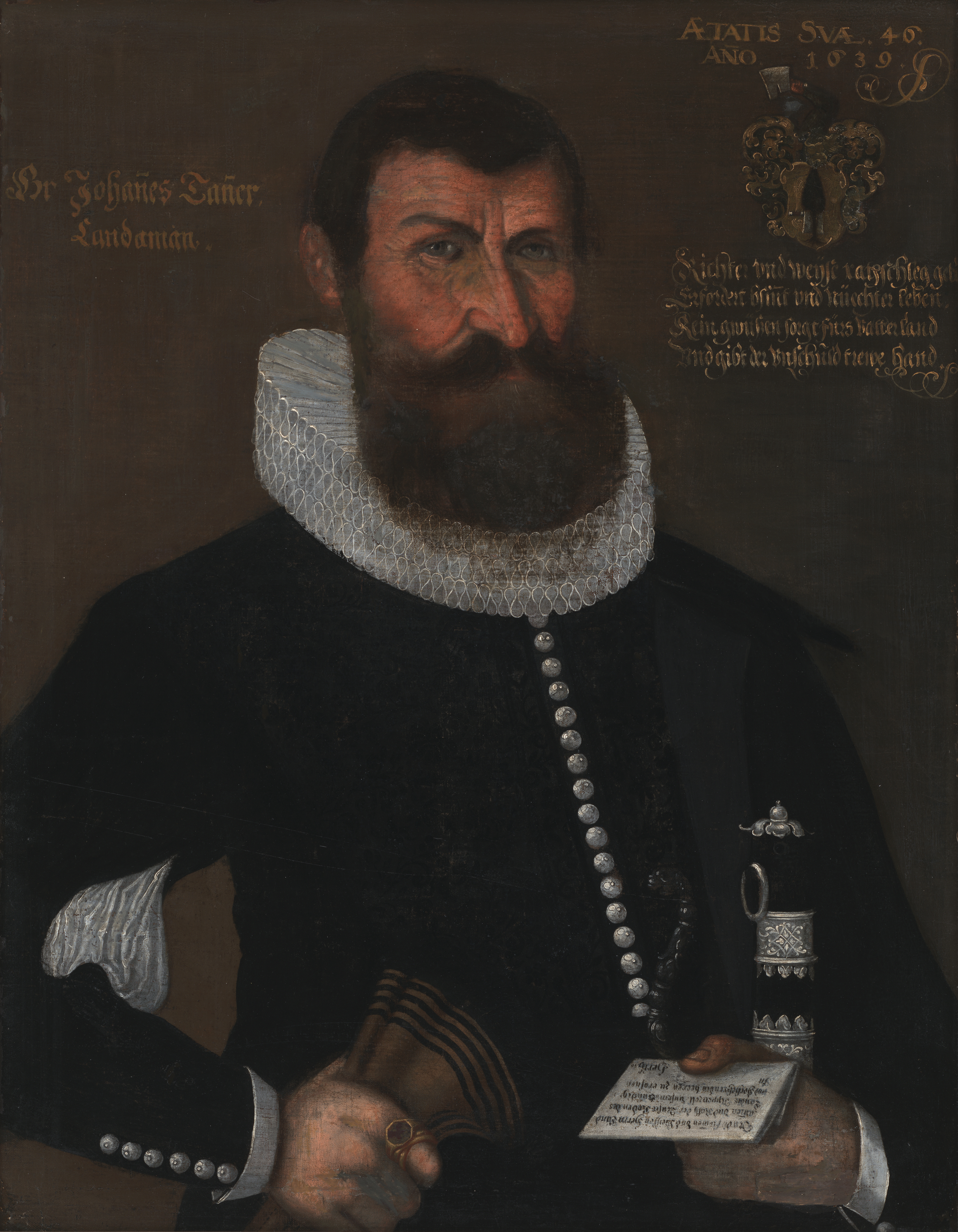 6. Landammann von Appenzell Ausserrhoden, Brustbildnis